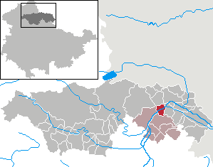 Bretleben in Thuringia - Kyffhäuserkreis